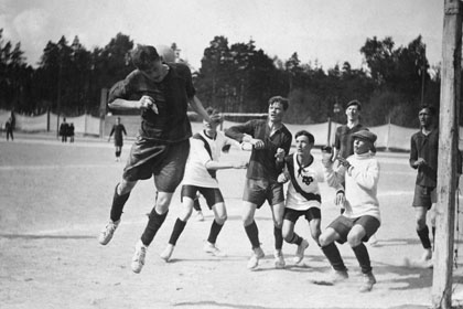 Jalkapallo-ottelu Helsingin Kisa-Veikot – Kiffen Eläintarhan kentällä 1910-luvulla.